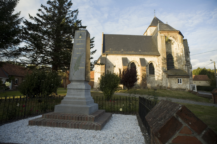 église Saint-Martin de Labroye, Pas-de-Calais, France.